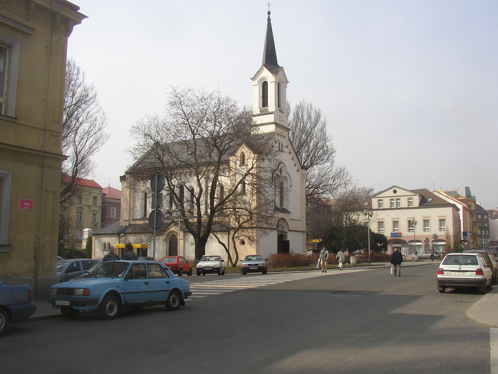 Česky: Děčín-Podmokly, kostel svatého Františka z Assisi (vybudován 1856-1858) na Husově náměstí. Česky: Děčín-Podmokly, St. Francis church (1856-1858) on Hus Square.